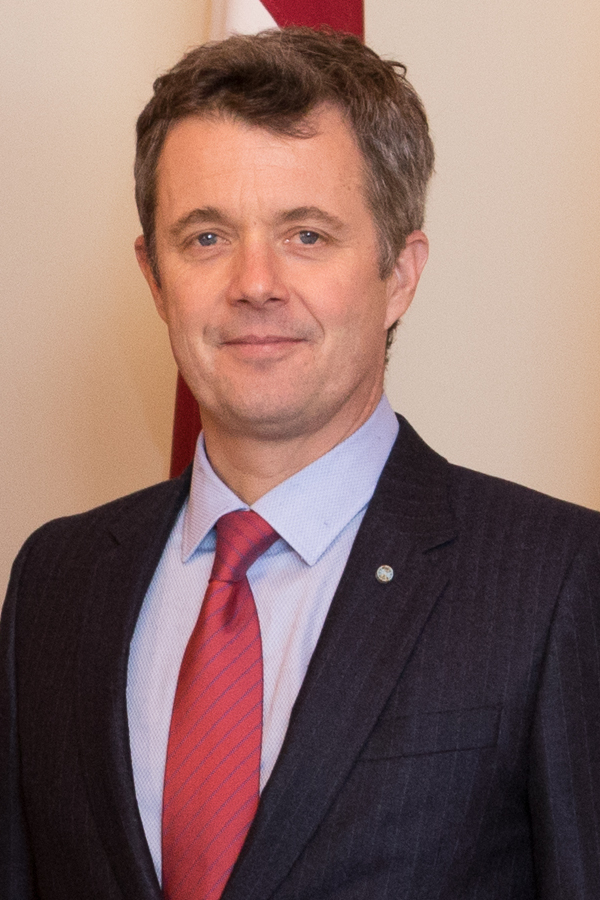 2018.gada 6.decembris. Saeimas priekšsēdētāja Ināra Mūrniece parlamentā uzņem Dānijas kroņprinci Frederiku un kroņprincesi Mēriju. Foto: Ernests Dinka, Saeima Izmantošanas noteikumi: saeima.lv/lv/autortiesibas